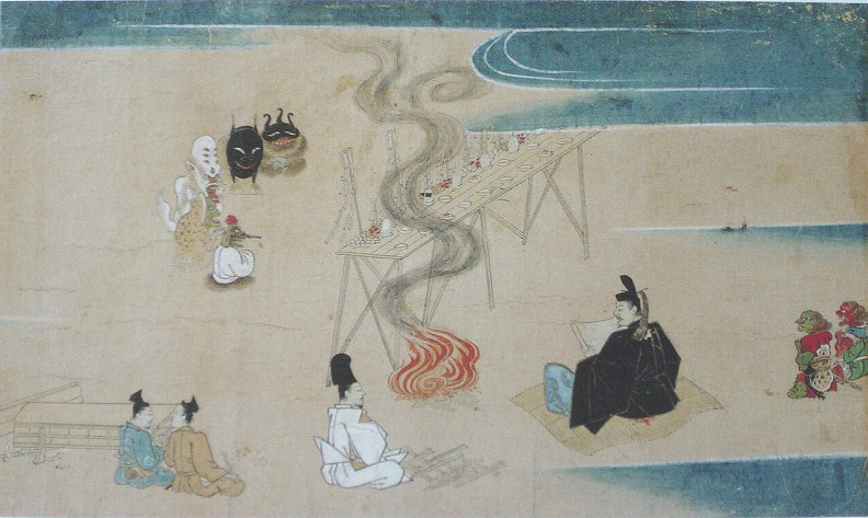 安倍晴明が疫病神を退治する様子